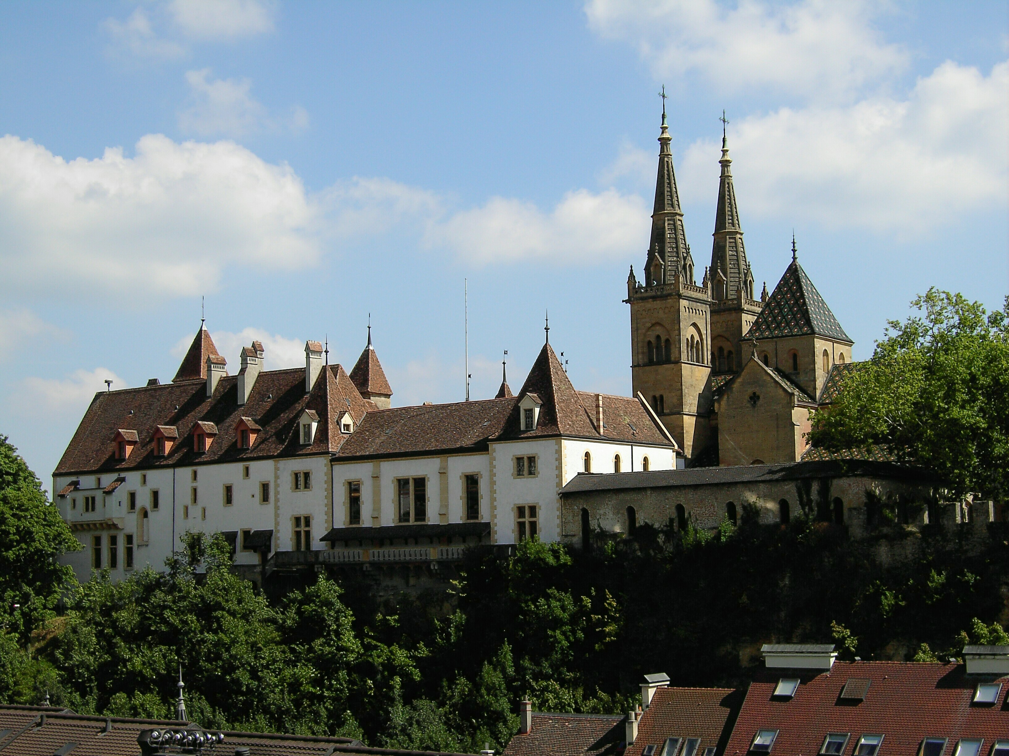 Neuchâtel, Le château, le cloître et la Collégiale (vus du nord)